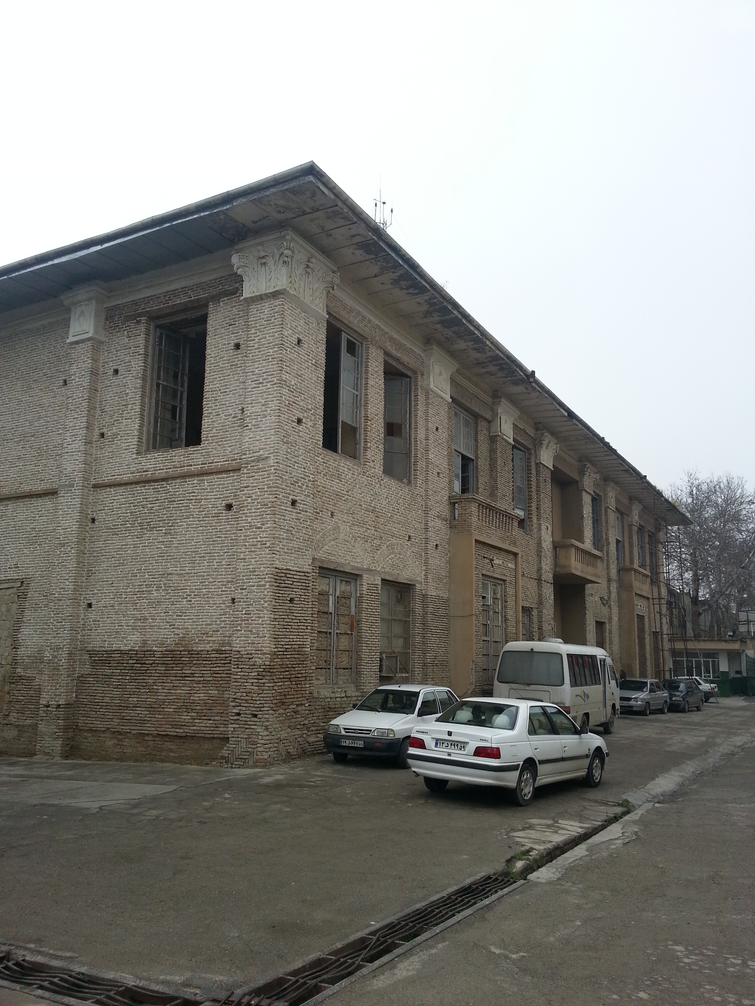 کاخ آقا محمدخان قاجار